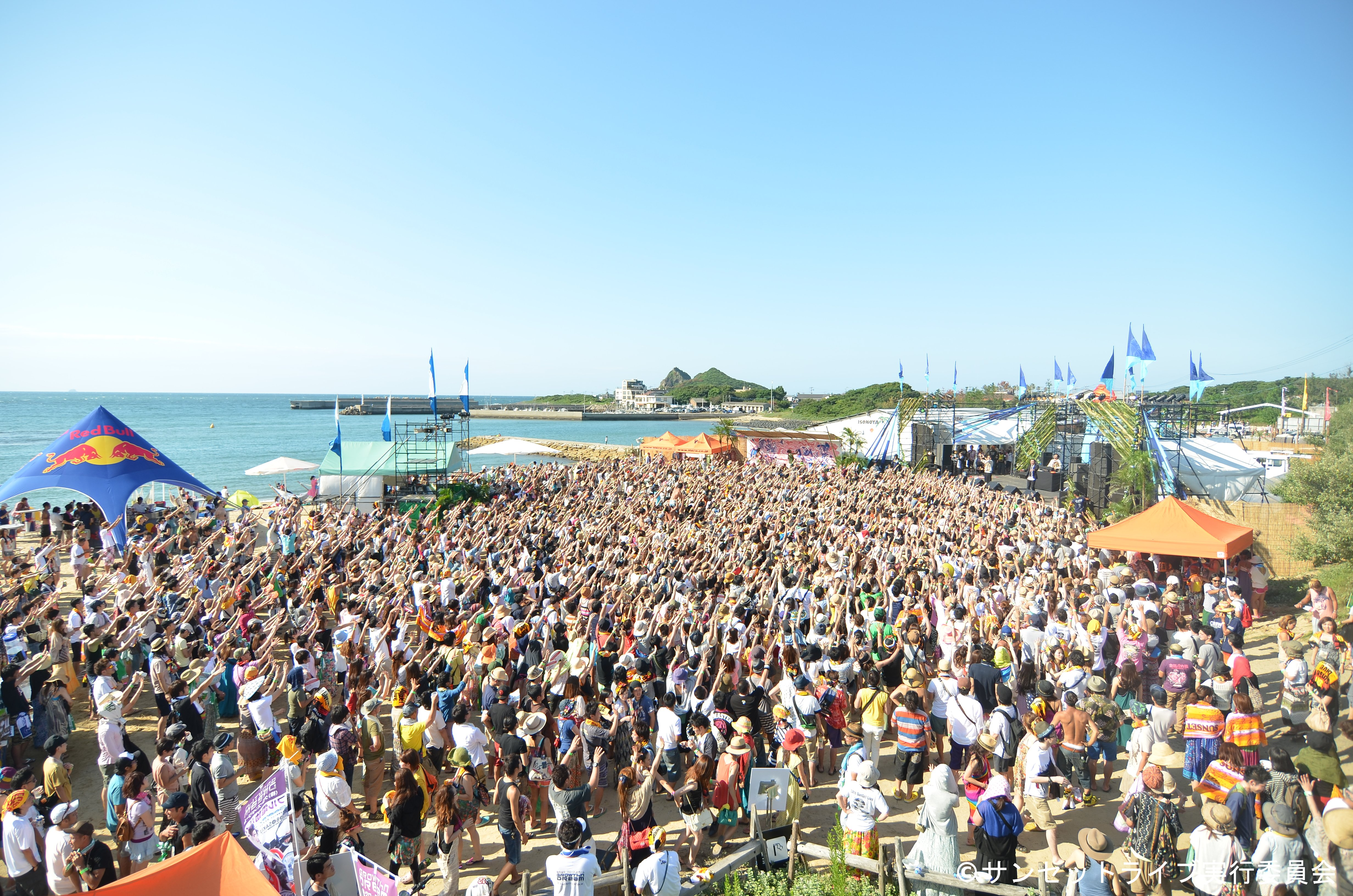 SUNSET LIVE